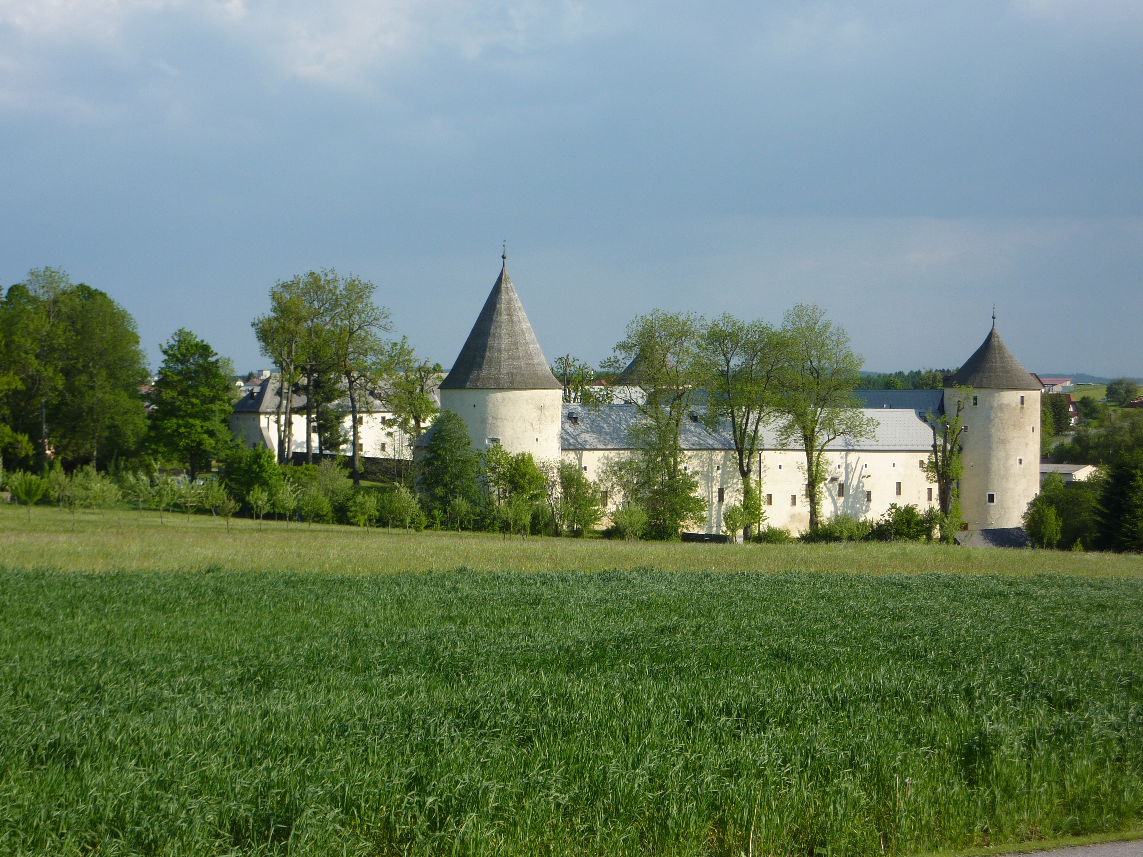 Schloss Ottenschlag, Niederösterreich - Nordwestseite